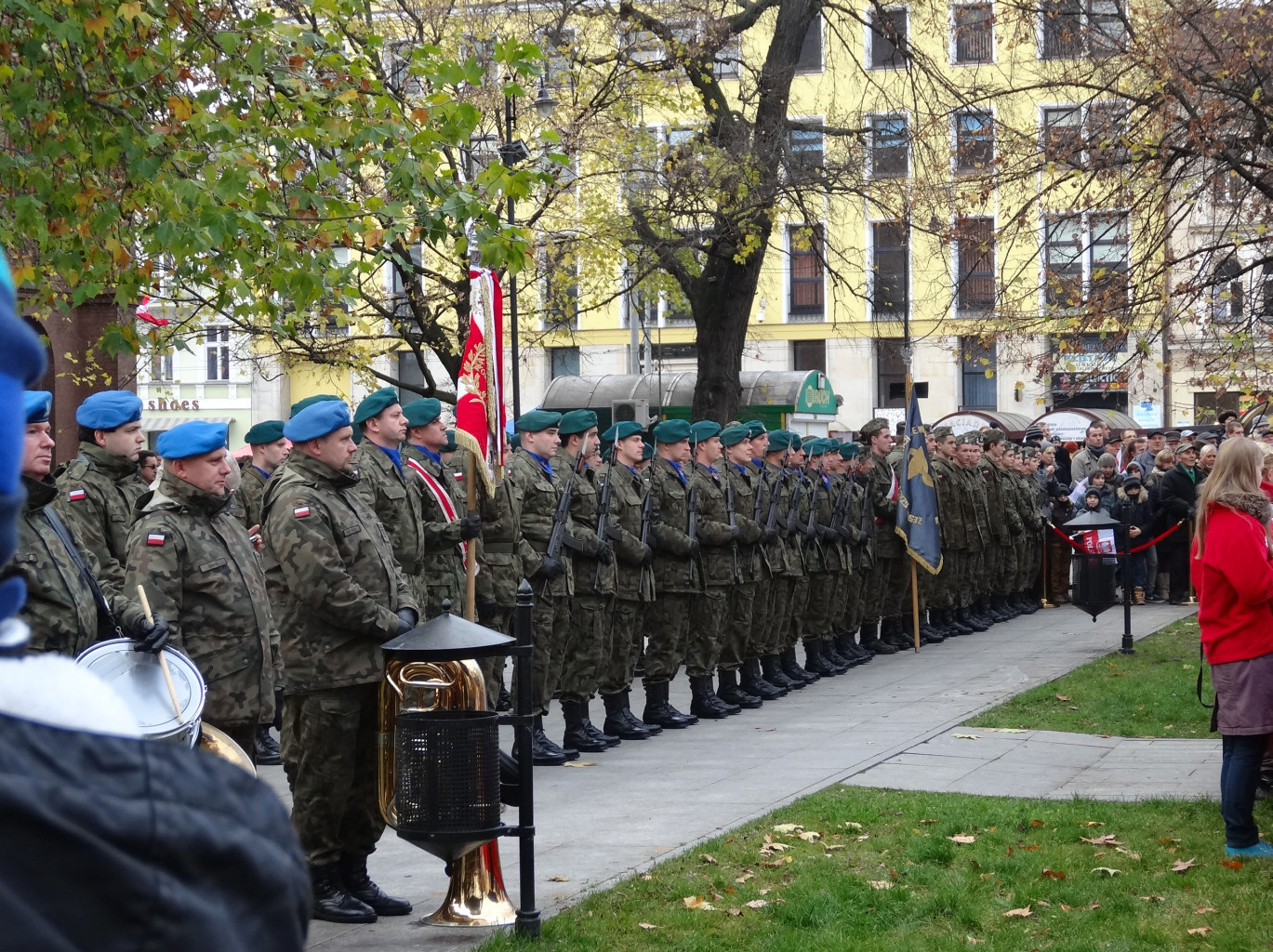 Plac Wolności w Bydgoszczy - Święto Niepodległości 2013